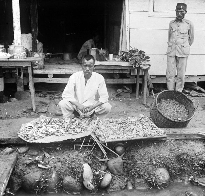 Repronegatief. Drie soorten benzoë te Tapanoeli